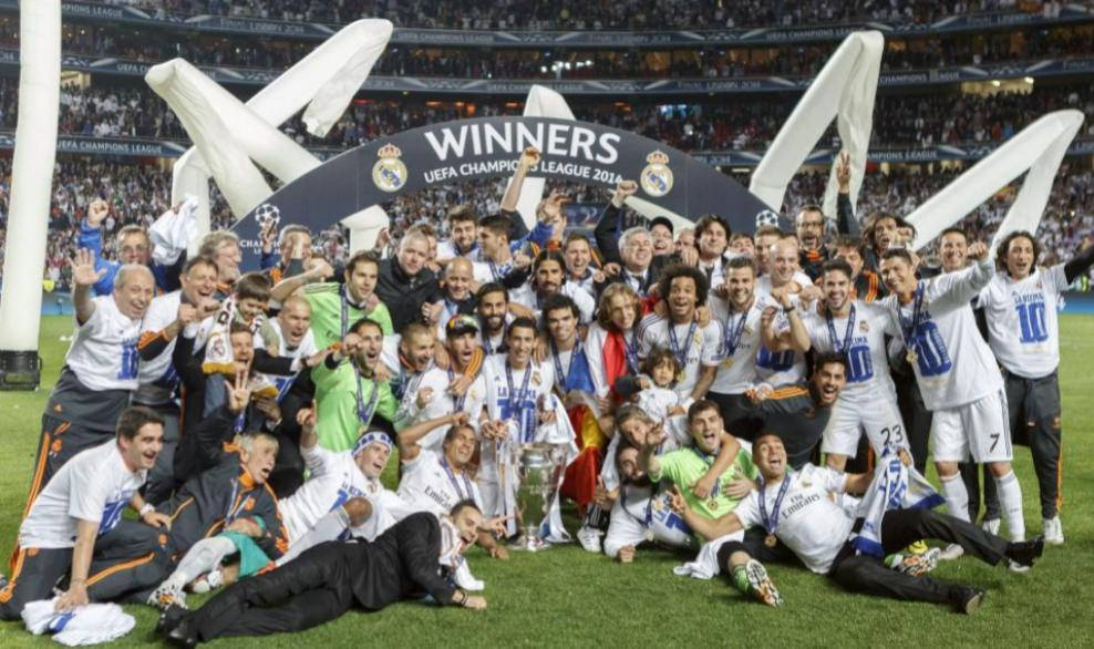 El Real Madrid gana la Décima Heroico triunfo blanco tras forzar la prórroga en el 93' gracias a un gol de Ramos. En el tiempo extra, Bale, Marcelo y Cristiano sentenciaron (4-1). Godín adelantó al Atlético. La familia crece. Ha tardado bastante más de lo previsto, pero los dos dígitos por fin han llegado y lo han hecho para quedarse. París (la Primera), Madrid (la Segunda), Bruselas (la Tercera), Stuttgart (la Cuarta), Glasgow (la Quinta), de nuevo Bruselas (la Sexta), Amsterdam (la Séptima), otra vez París (la Octava), Glasgow también repitió (la Novena) y Lisboa (la tan deseada Décima), que desde este 24 de mayo de 2014 pasa de ser simple capital vecina a ciudad eterna y sagrada para el madridismo. Sí, han sido doce años muy largos, de tempraneras eliminaciones, de penaltis envenenados, de semifinales metamorfoseadas en día de la Marmota, de llantos sin consuelo, de pesadillas inimaginables, de millones (de euros) de desilusiones... Sí, han sido doce años de interminable espera, pero hoy todo eso ya es pasado. Las mofas y los (malos) chistes han llegado a la meta. La Décima ya no son los padres. Es real. Tangible. Y, sobre todo, de belleza infinita. Sí, el Real Madrid es campeón de Europa, y son diez entorchados en 58 ediciones. Honor y gloria a tan tremenda hazaña. Ni Florentino Pérez, ni siquiera don Santiago Bernabéu, hubieran escrito un guión tan apolíneo para lograr la Décima: eliminar al subcampeón (Borussia Dortmund) en cuartos de final; mandar a casa, humillación inclusive, al campeón y enemigo europeo por antonomasia (Bayern Múnich) en semifinales; y levantar la «Orejona» tras noquear en la final al Atlético en el derbi madrileño más importante de los 111 años de inmortal rivalidad. (Narración y estadísticas) Fuente información